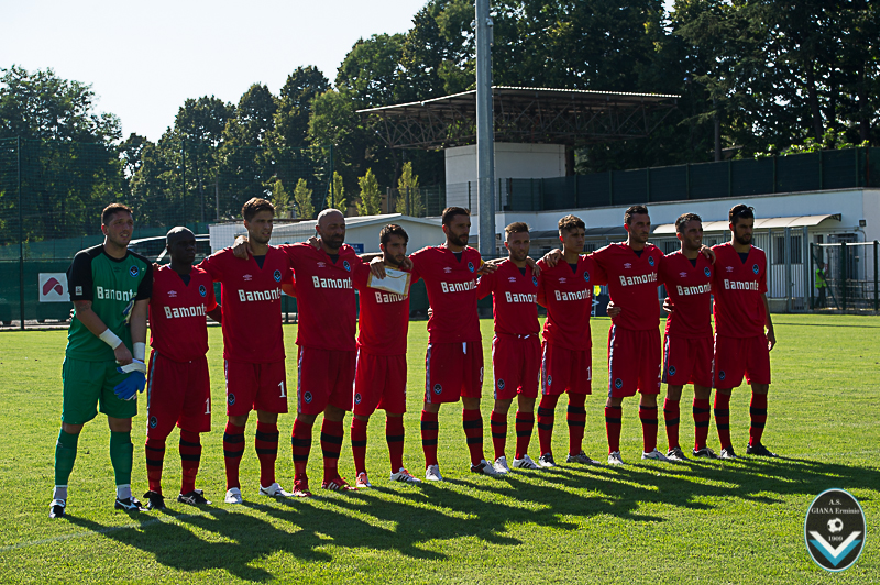 Formazione iniziale dell'A.S. Giana Erminio in occasione della gara interna contro la Carrarese, valida per il campionato di Lega Pro 2016-2017